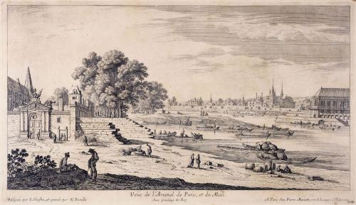 Arsenal et mail vers 1650